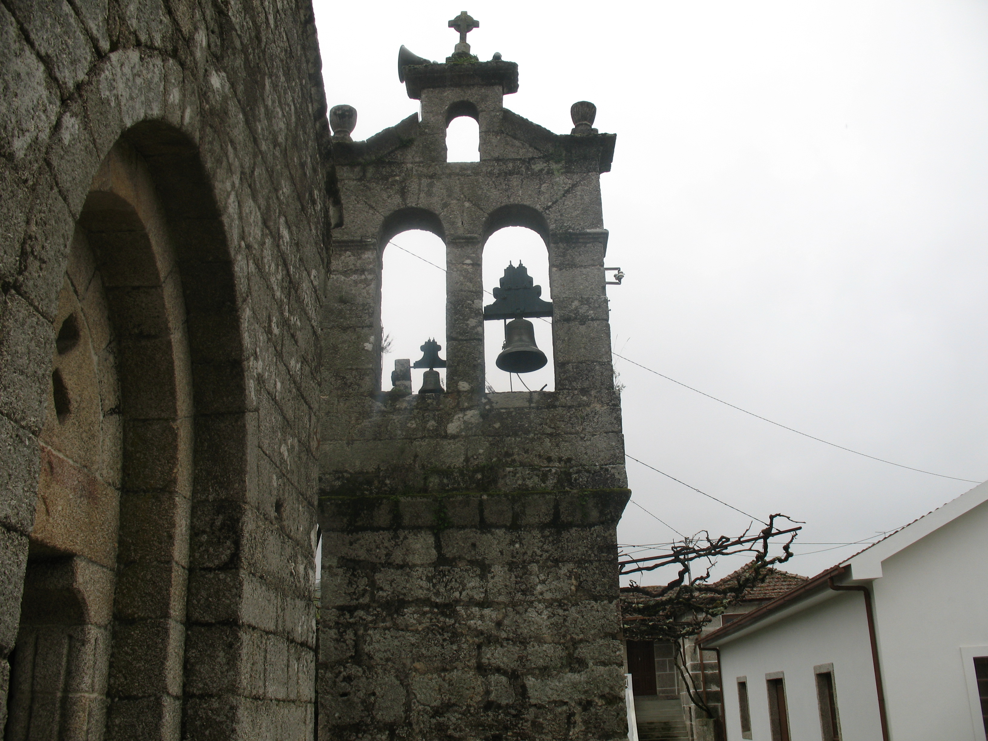 Amarante Igreja Românica de Jazente